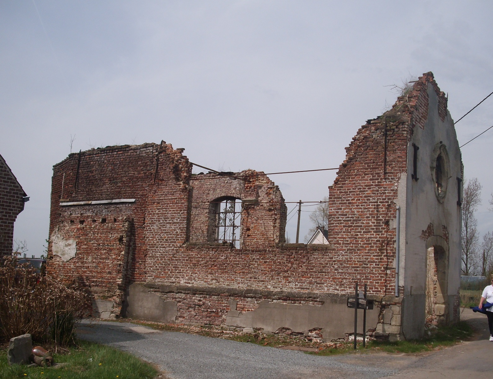 De Onze Lieve Vrouw van Bijstandskapel in de Leliestraat in Godveerdegem - Zottegem - Oost-Vlaanderen - België